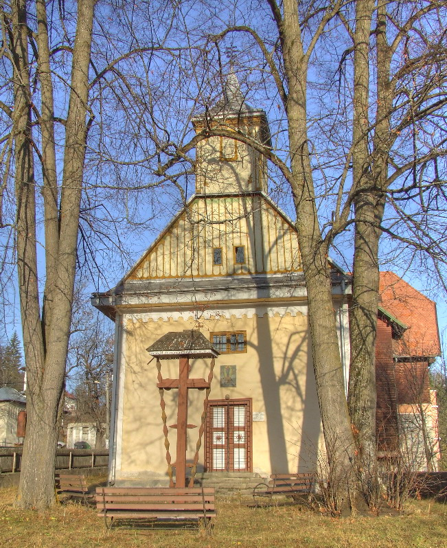 Biserica de lemn din Borsec, judeţul Harghita.